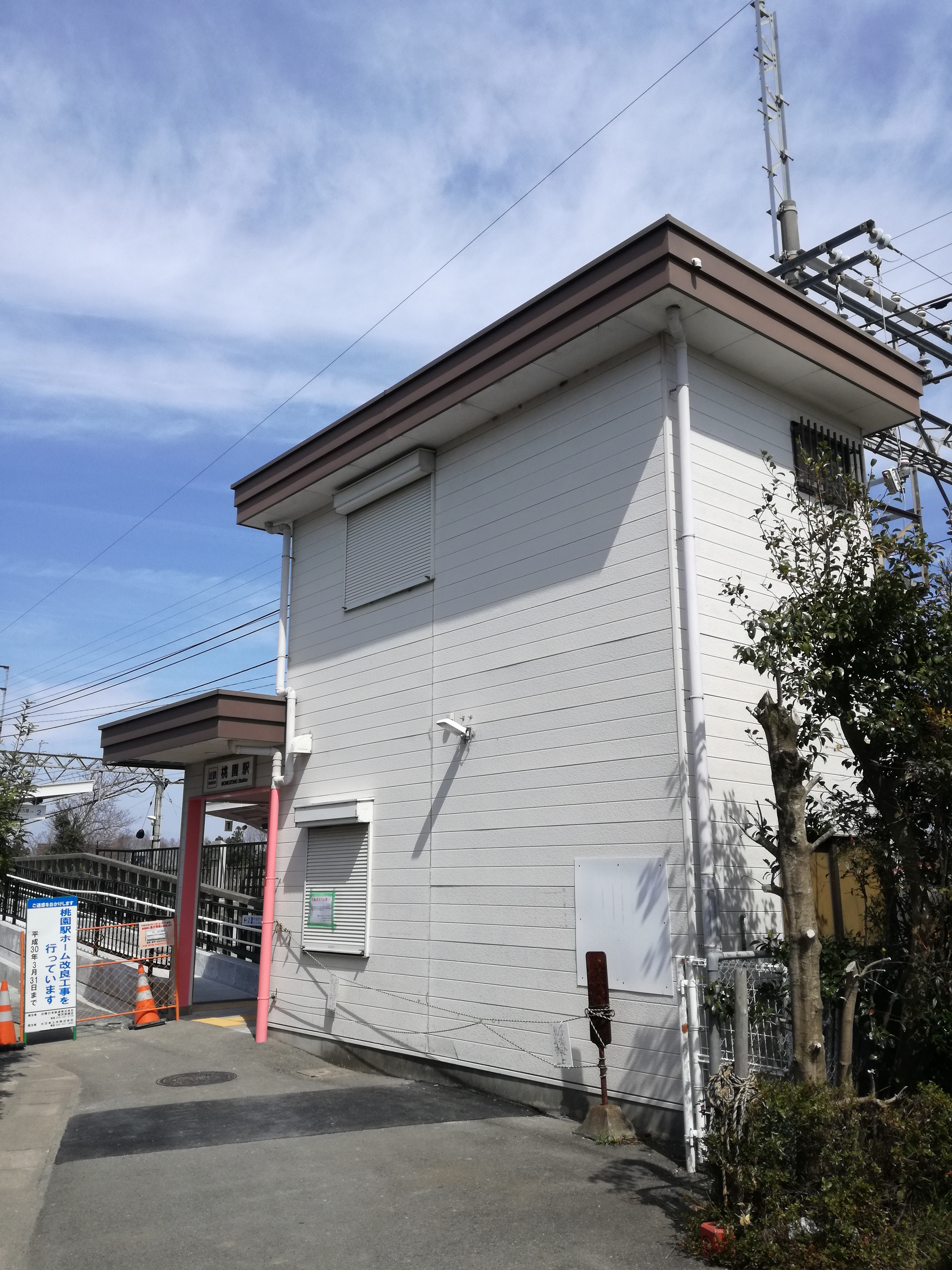 桃園駅駅舎。桃園駅北側には踏切が迫っているため、2018年に行われたホーム延長に際しては、下りホームに通じるスロープ部分を潰して南側にもホームを延長した。そのため、駅舎から下りホームに直接通じるスロープを設置して代替路を確保している。2005年当時の写真と比べると（File:桃園駅駅舎.JPG）、駅舎北側の壁が取り払われて、通路が新設されていることがわかる。